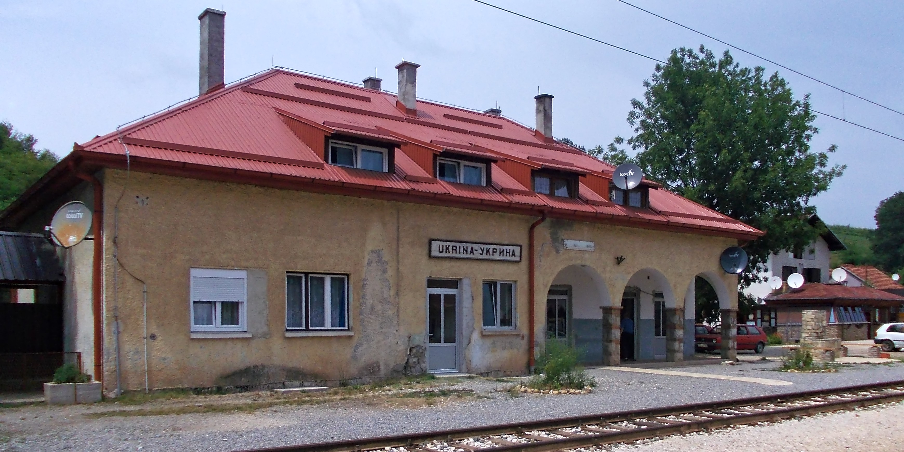 Жељезничка станица у Укрини-Старој Дубрави